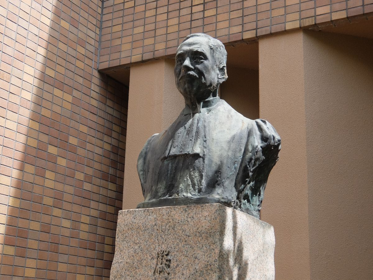 京都大学本部構内、法経済学部北館の西側にある織田萬像。織田萬（1868-1945）は京都帝国大学法学部教授を務め、のち名誉教授。常設国際司法裁判所判事、関西大学学長、財団法人立命館名誉総長なども務めた。